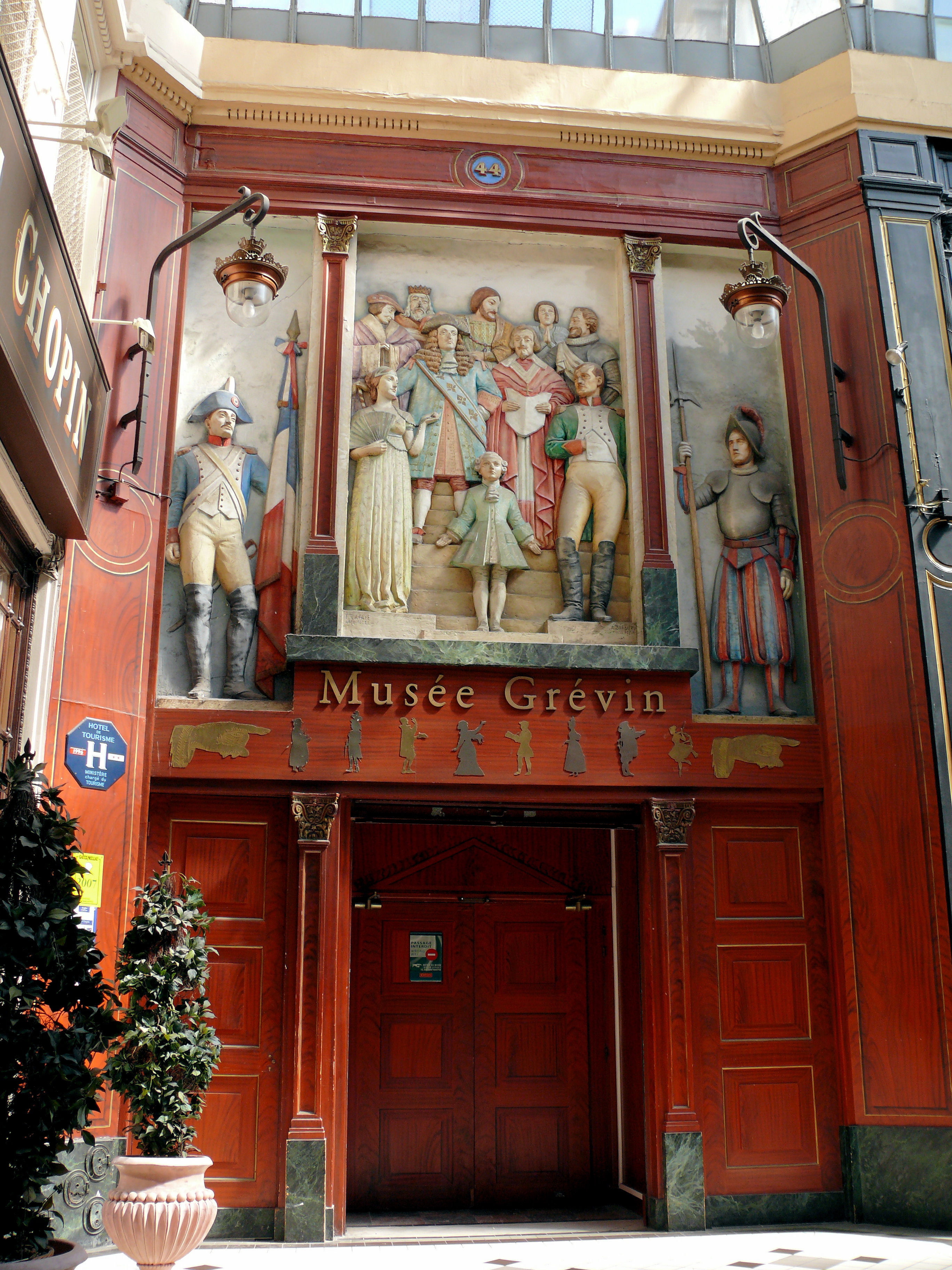 Paris 9ème arrondissement - Passage Jouffroy - Une entrée du musée Grévin dans le passage